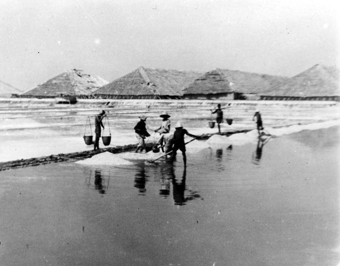 Repronegatief. Zoutwinning op Madura. De zouthopen worden afgedekt met dakbedekking, wat een eenvoudige, kostenbesparende en bruikbare dakconstructie opleverd